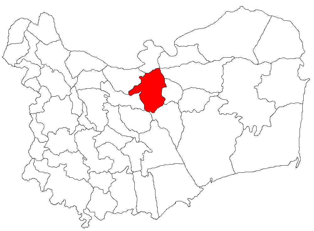 Categorie:Hărţi ale judeţului Tulcea